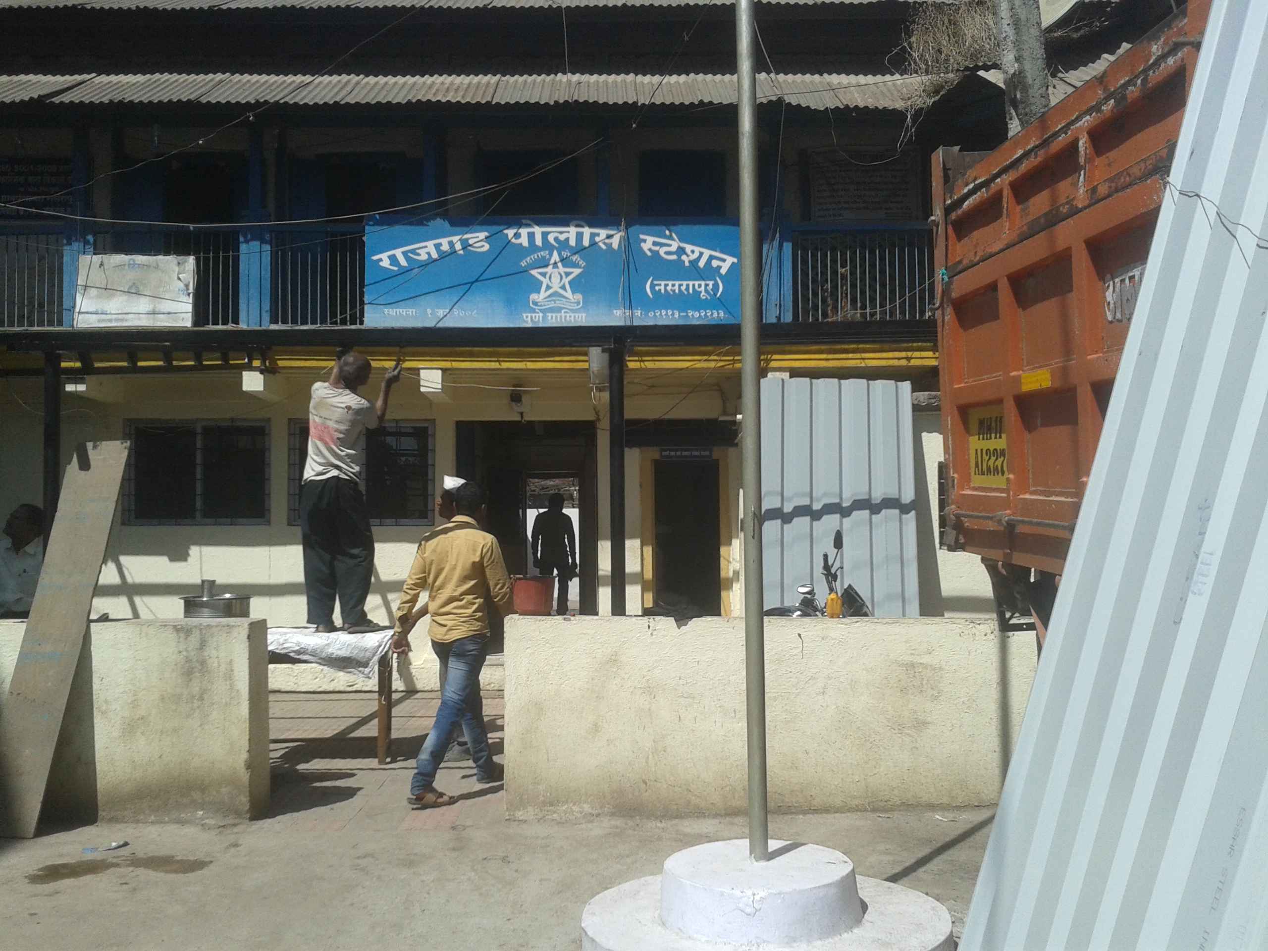 राजगड पोलीस स्टेशन नसरापूर